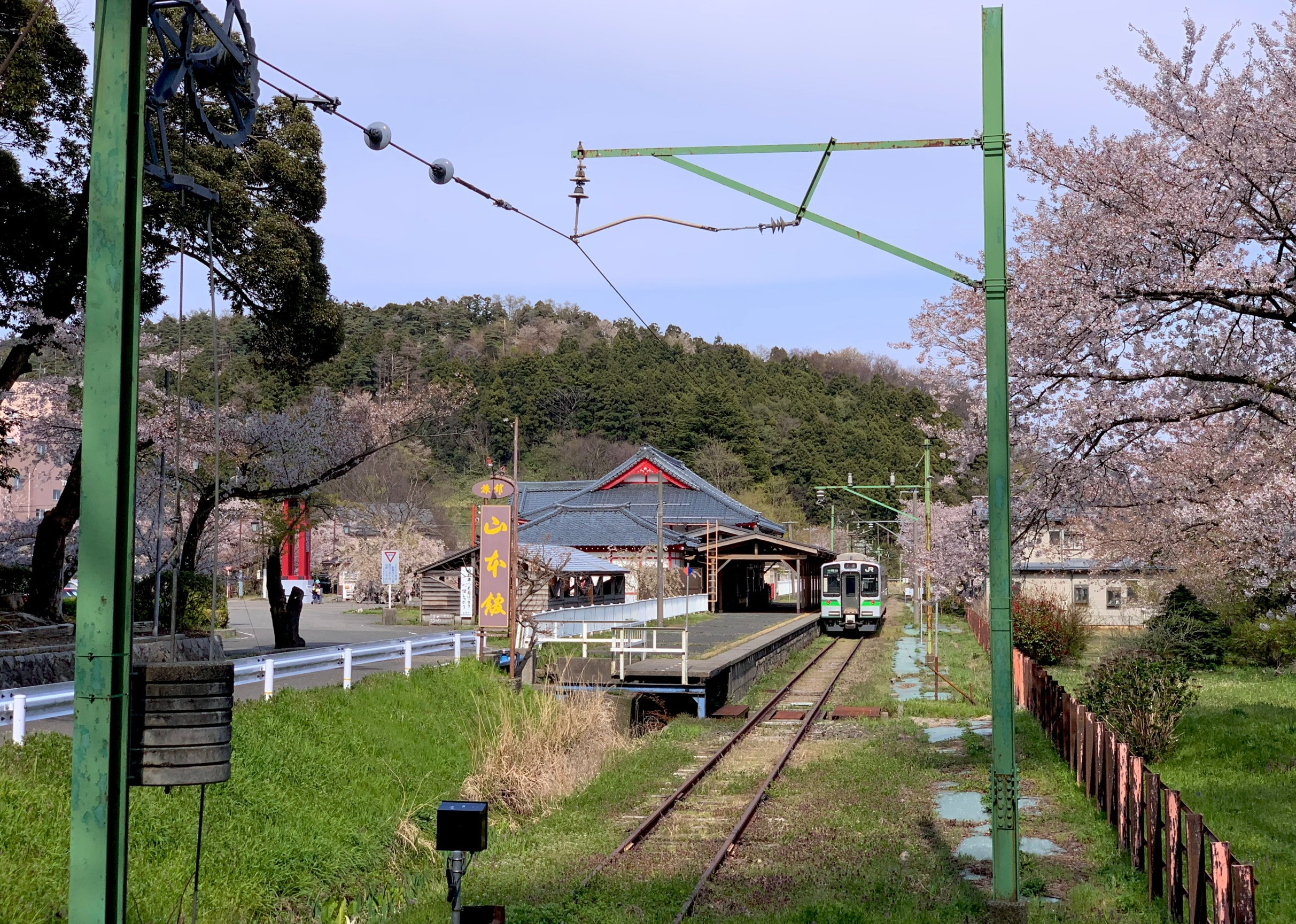 直接吊架式が特徴的な弥彦線の起点（弥彦駅，2020年4月）